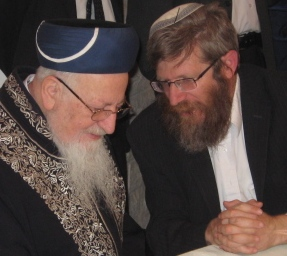 הרב צבי קוסטינר עם הרב מרדכי אליהו.